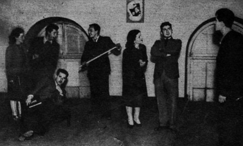 Durante un ensayo. Vemos a PEDRO DE LA BARRA dirigiendo a los jóvenes actores. Acabaron de estrenar una égloga de Juan de la Encina y el sabroso entremés "El deseoso de casarse". Proyectan nuevos estrenos.